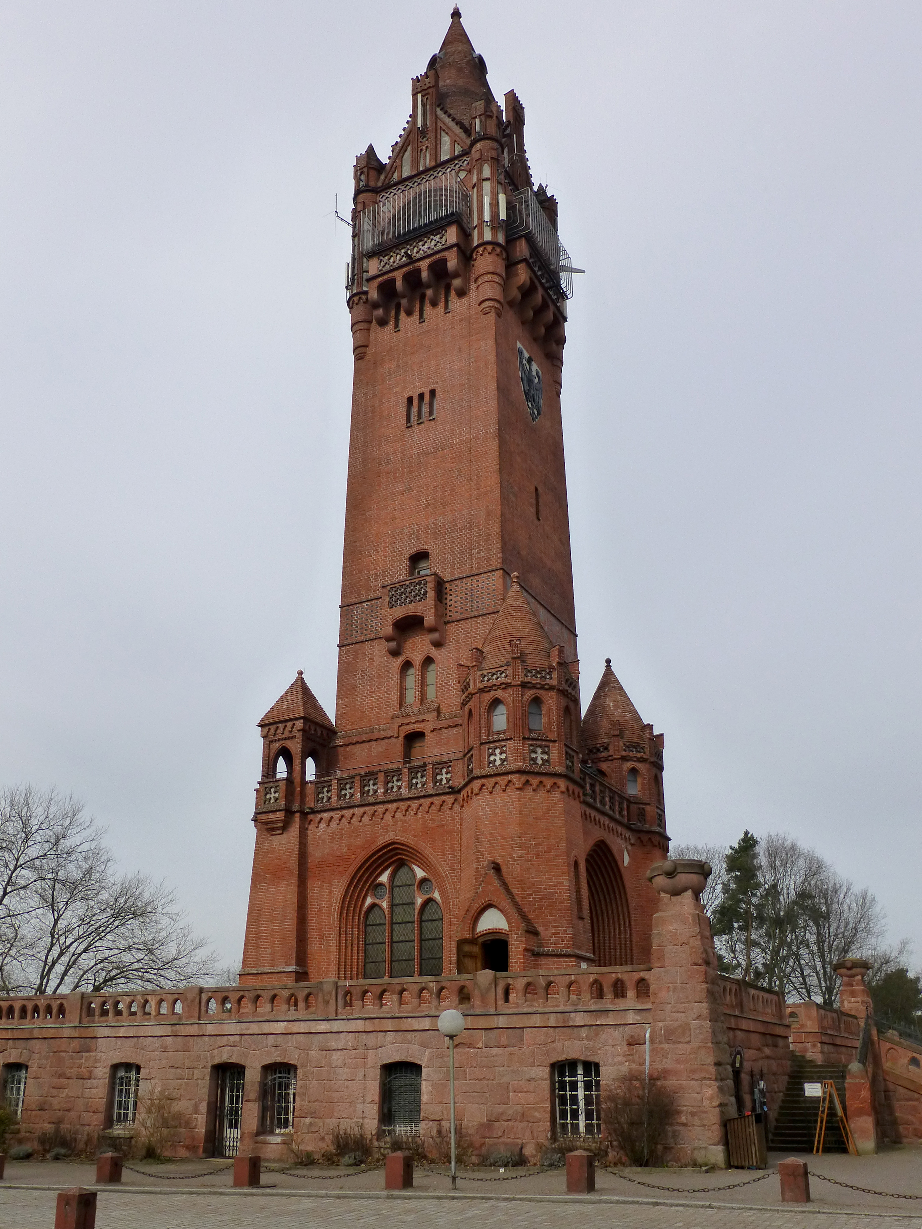 Grunewaldturm; Seitenansicht von Ostsüdosten